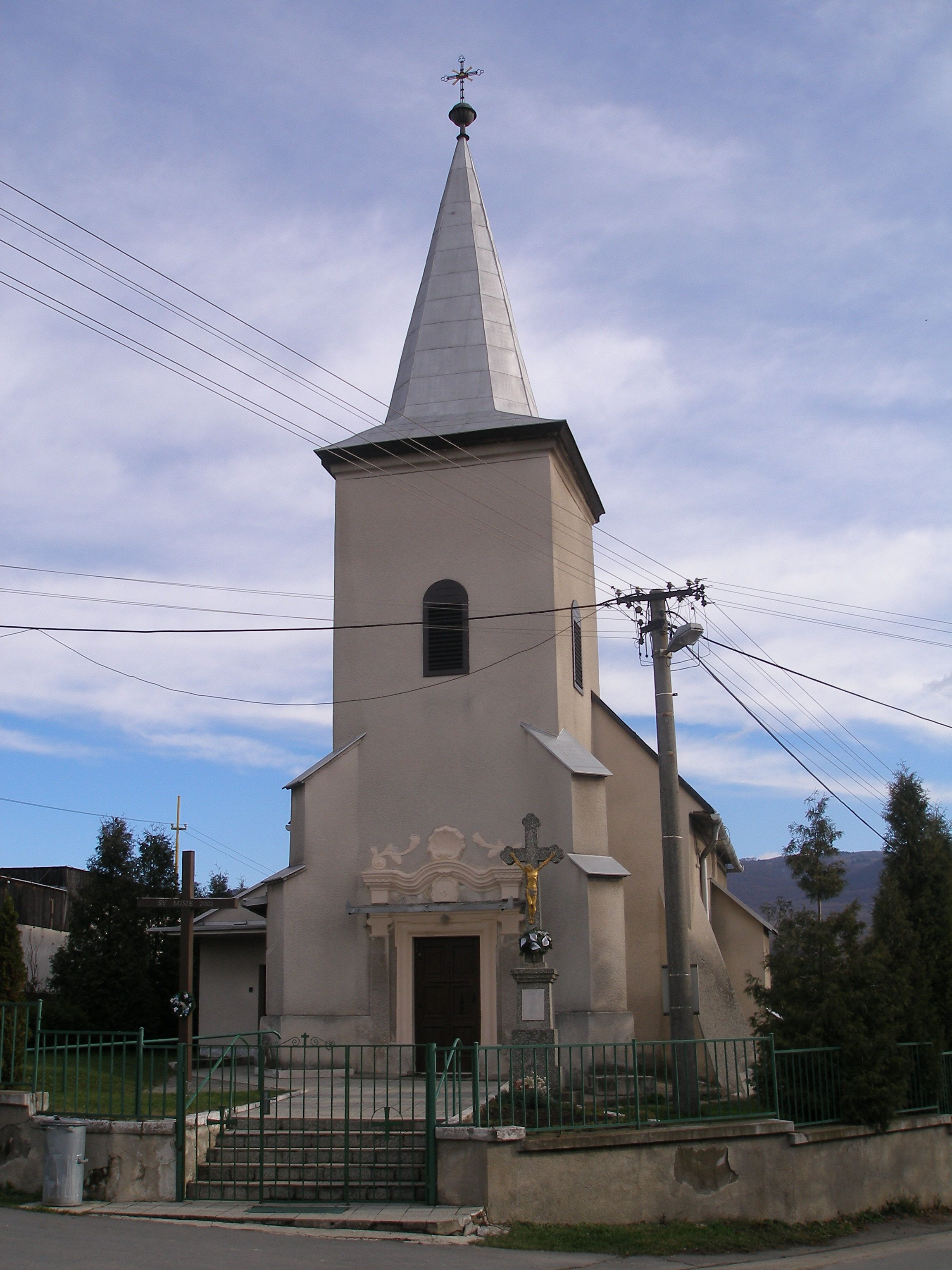 Obec Teriakovce v okrese Prešov